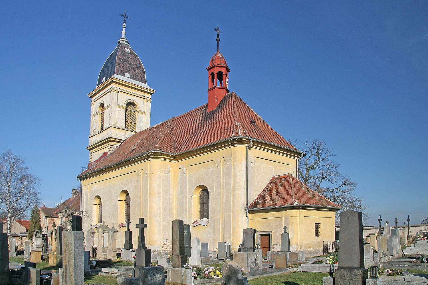 Chleby, okres Nymburk - kostel Panny Marie a svatého Vavřince.